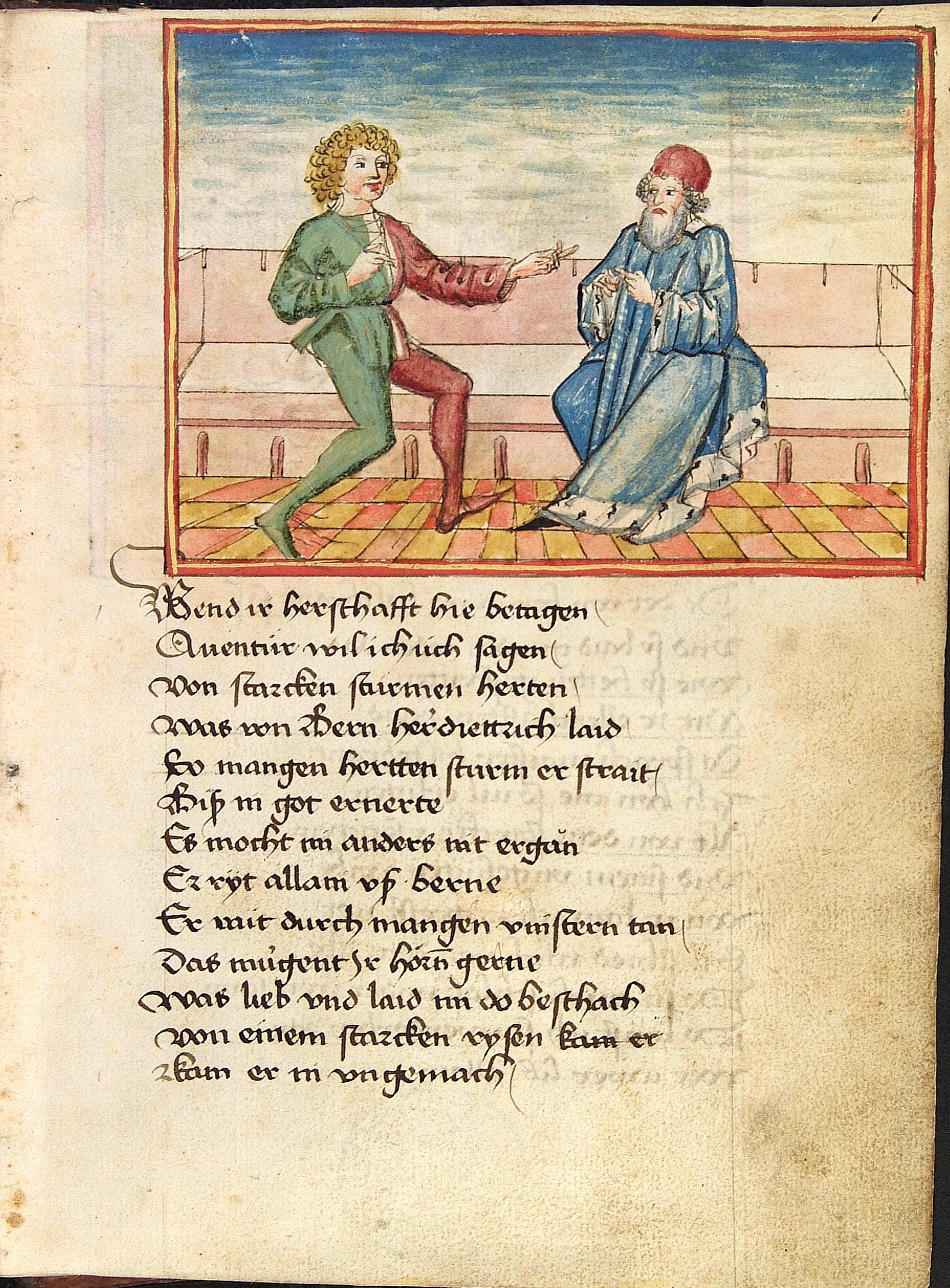 Codex Palatinus germanicus 67, Blatt 1r - Sigenot, ein Erzähler im Mi-Parti-Gewand eines Barden trägt einem Zuhörer die Geschichte vor (erstes Textblatt)